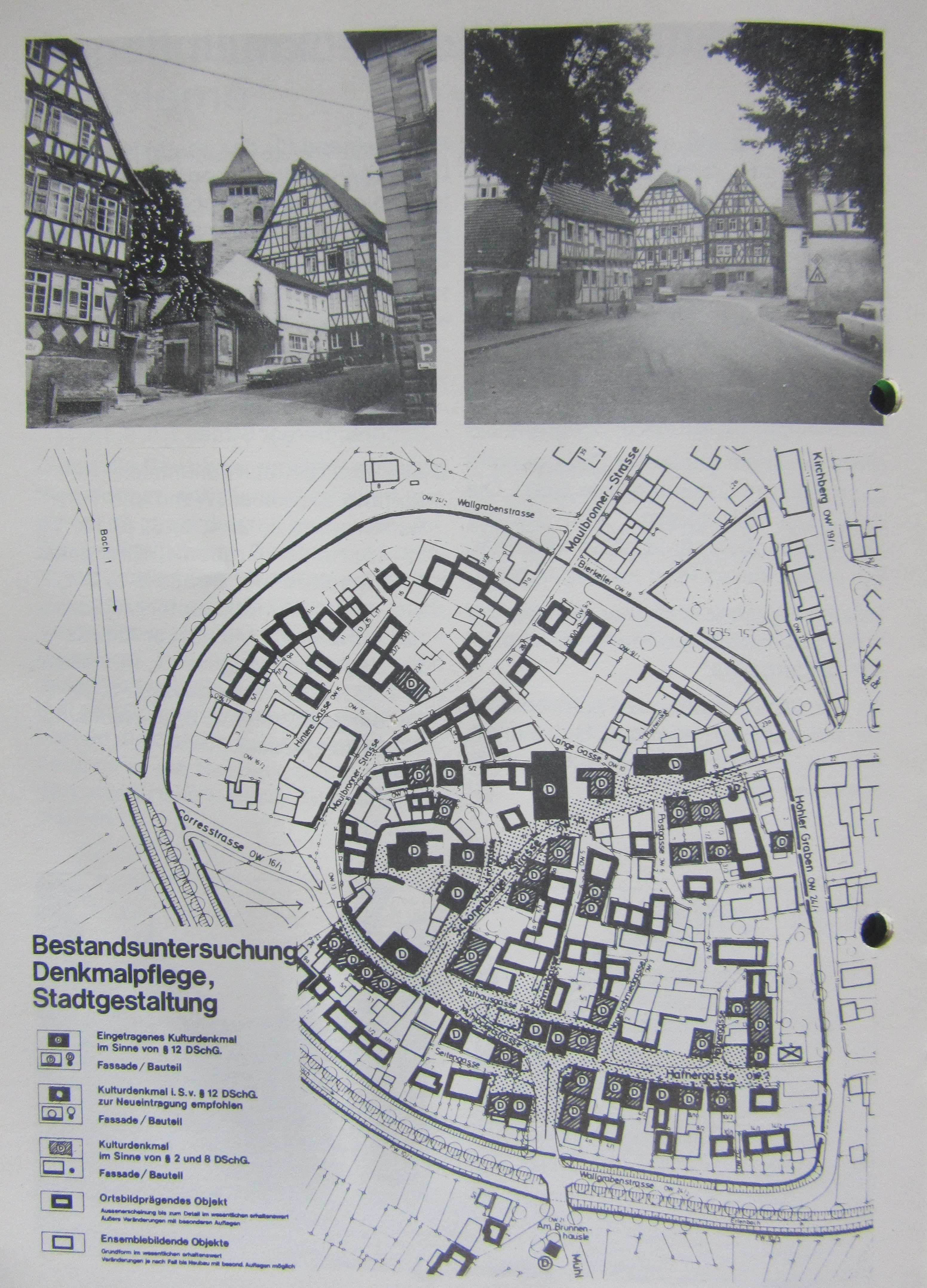 Fotografiert aus aus der Broschüre: Dorfentwicklung Ötisheim, Kommunalentwicklung Baden Württemberg, 1977